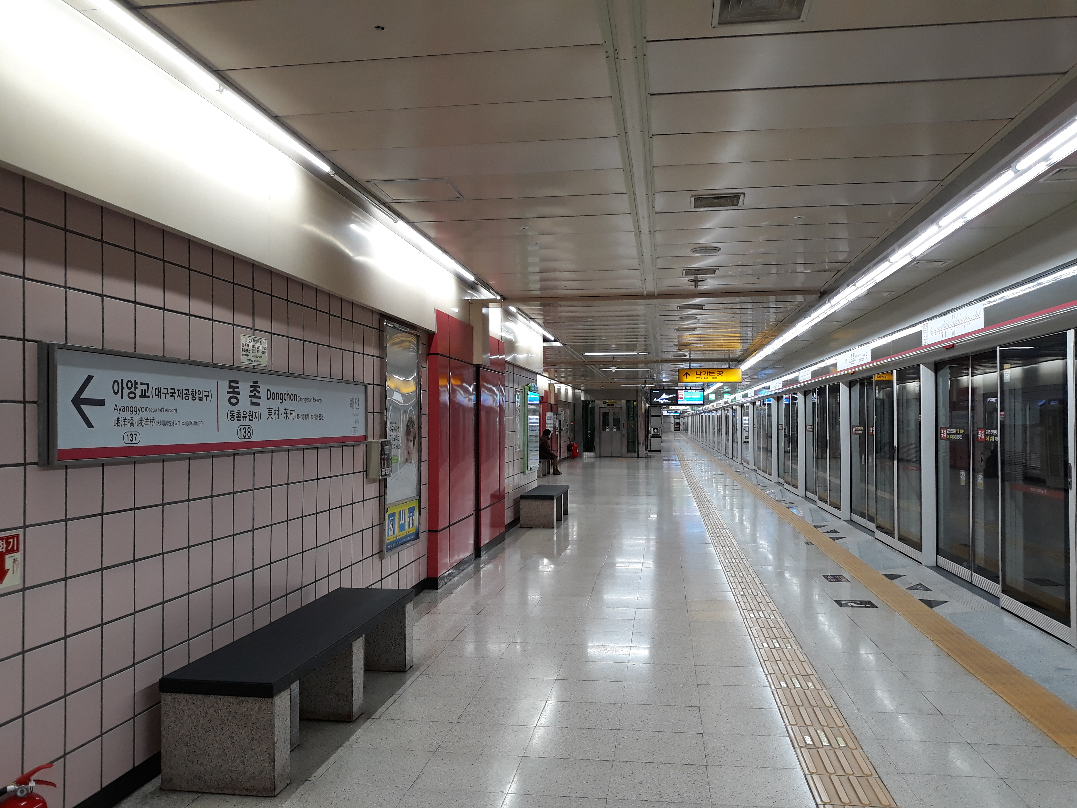 대구 도시철도 1호선 동촌역 설화명곡 방면 승강장